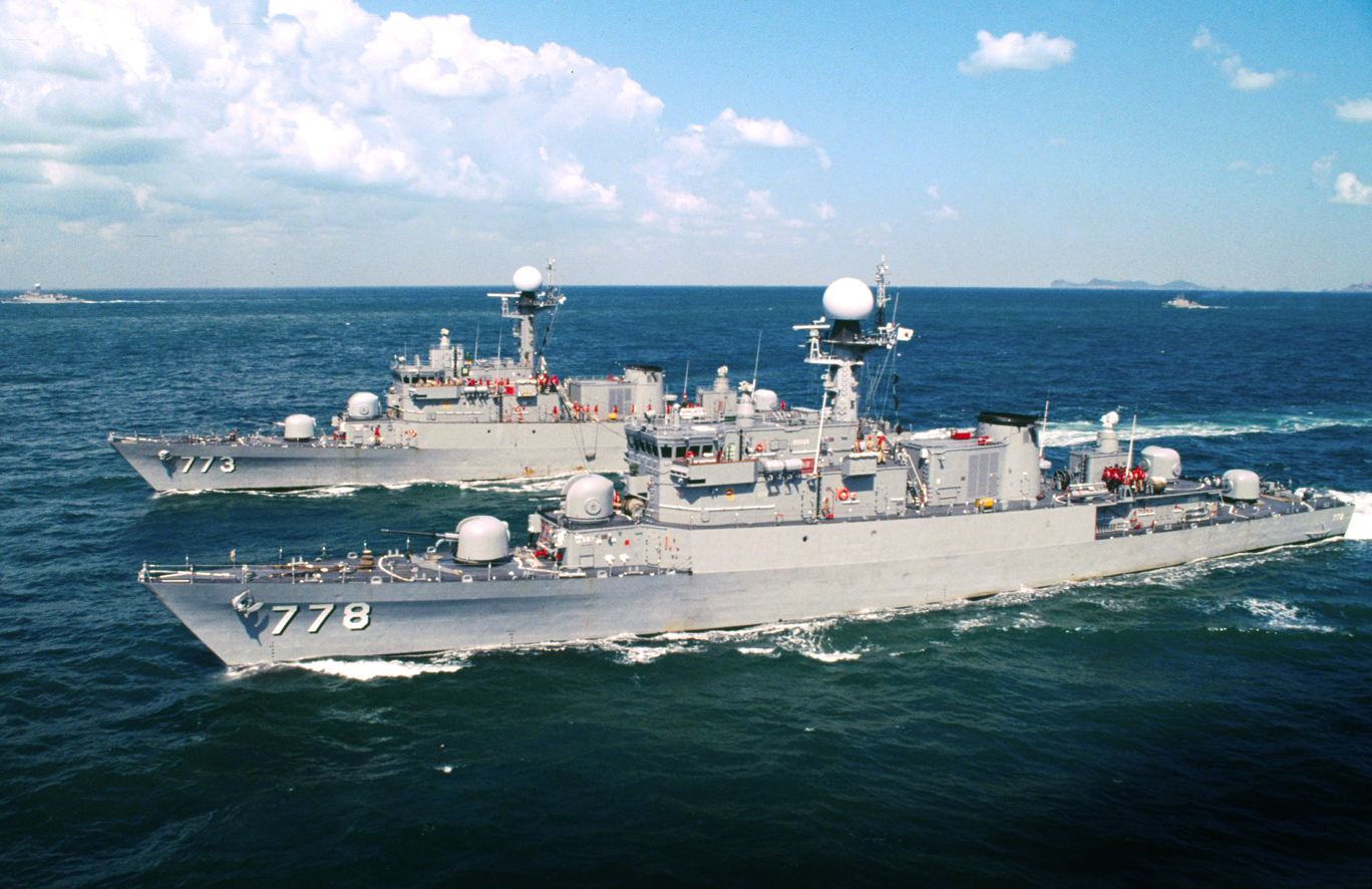 본 사진은 해군에서 촬영한 사진입니다